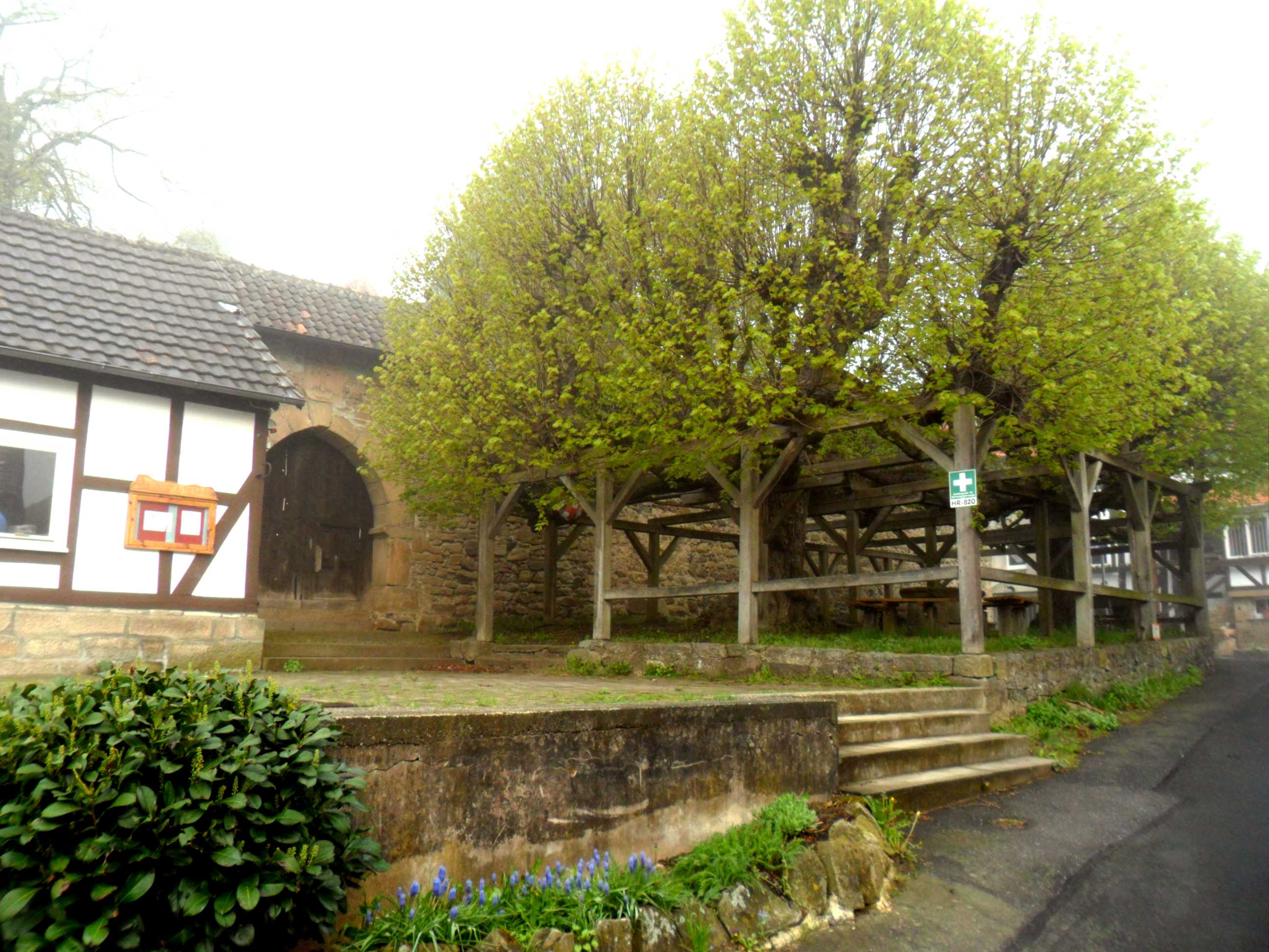 Berndshausen – (Kreis Schwalm-Eder; Bundesland Hessen); Gerichtsplatz im Westen von Nordwesten mit Linde und Ringstützen in Übersicht-05052013